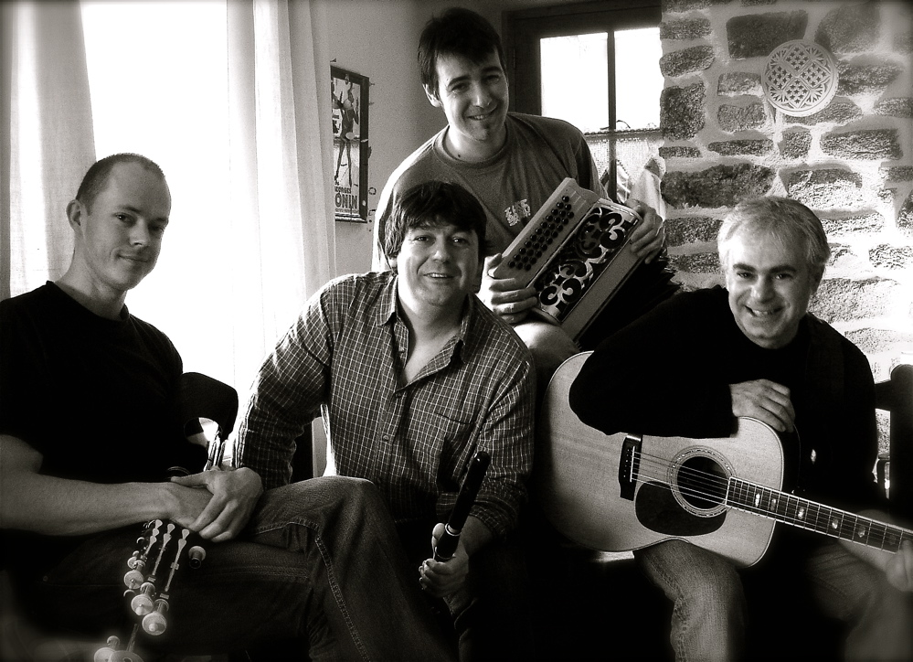 Strollad Carré Manchot